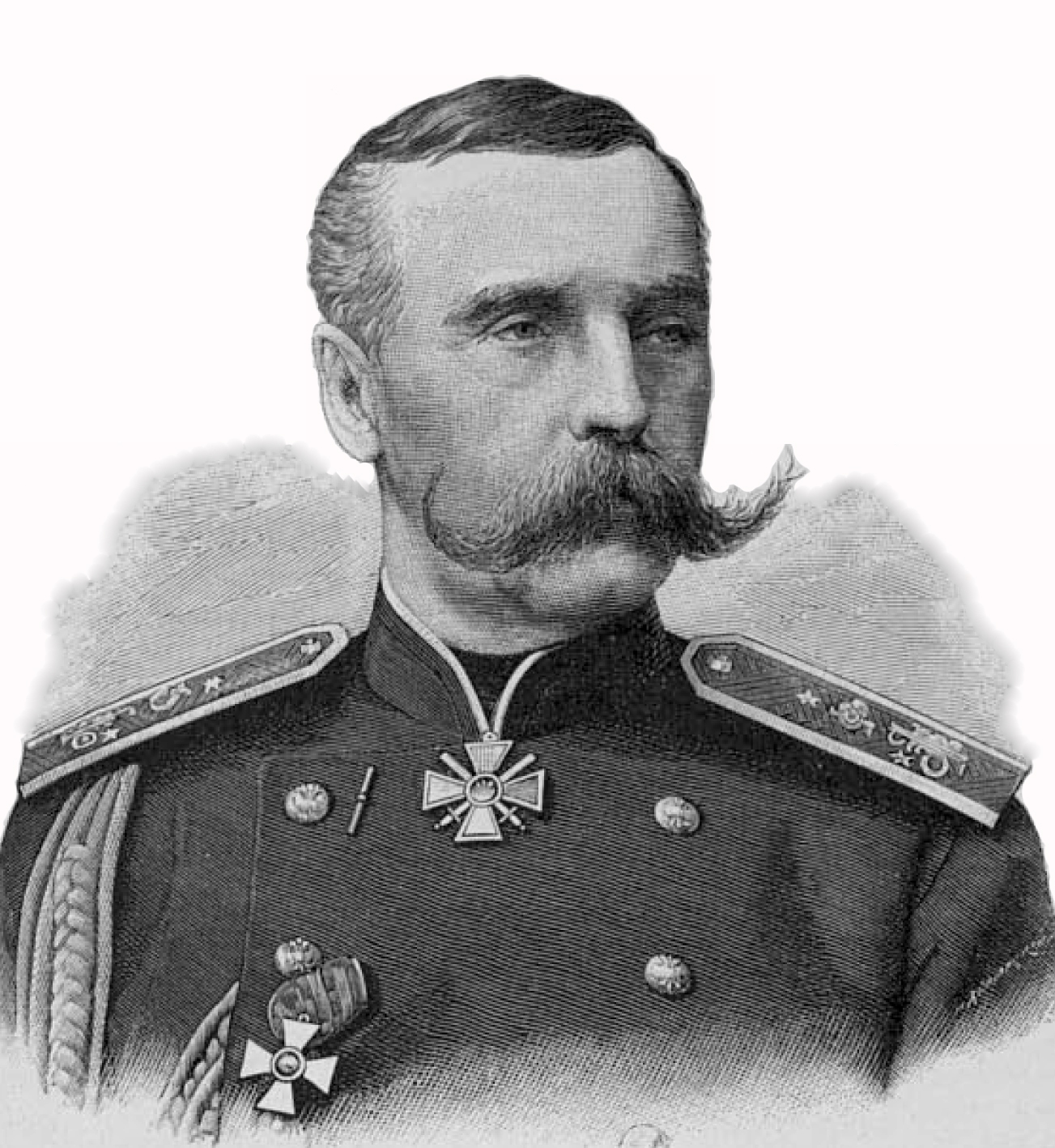 Генерал Дризен Александр Фёдорович, 1880-е годы